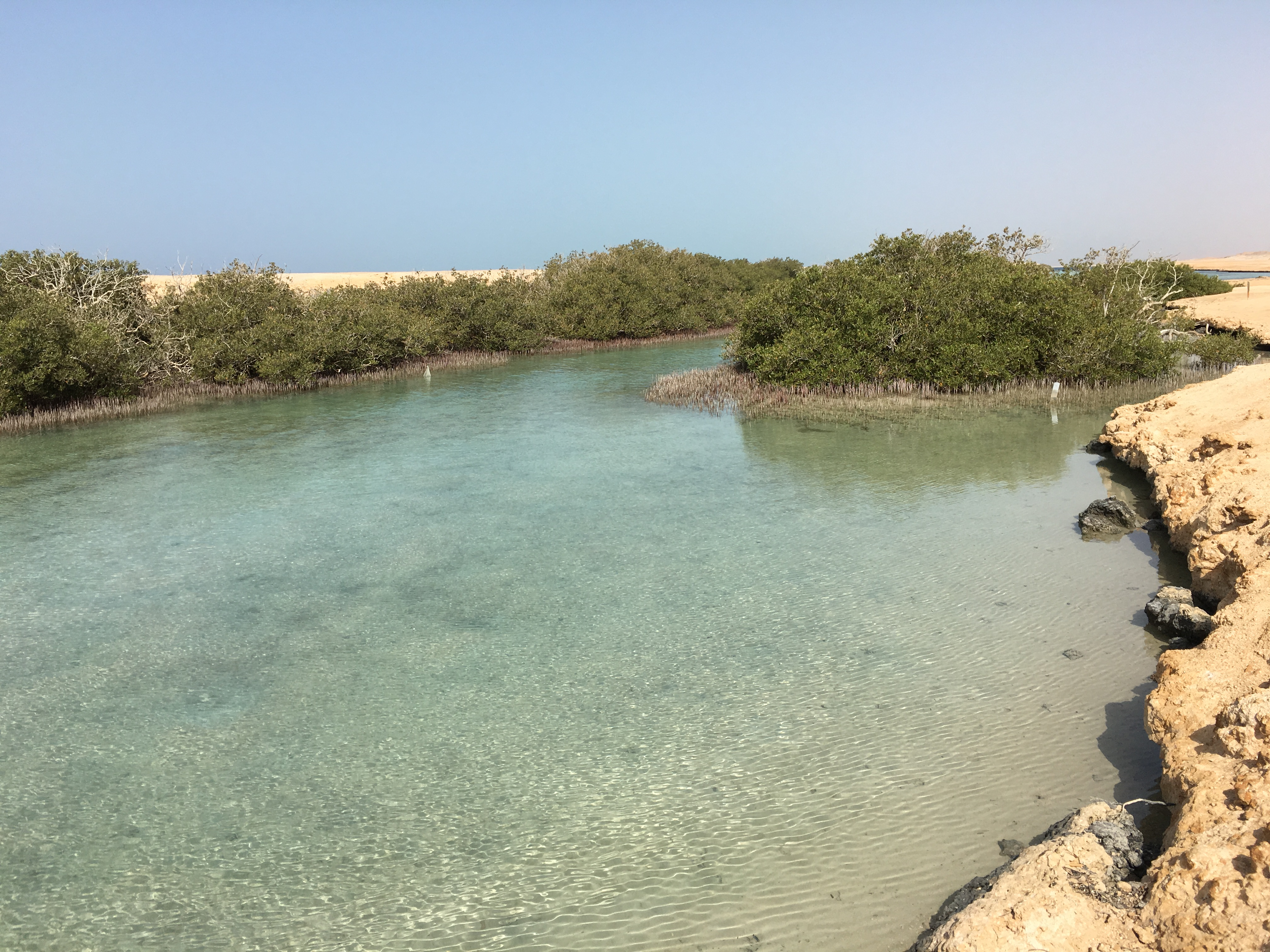 محمية راس محمد ، تصوير حاتم مشير